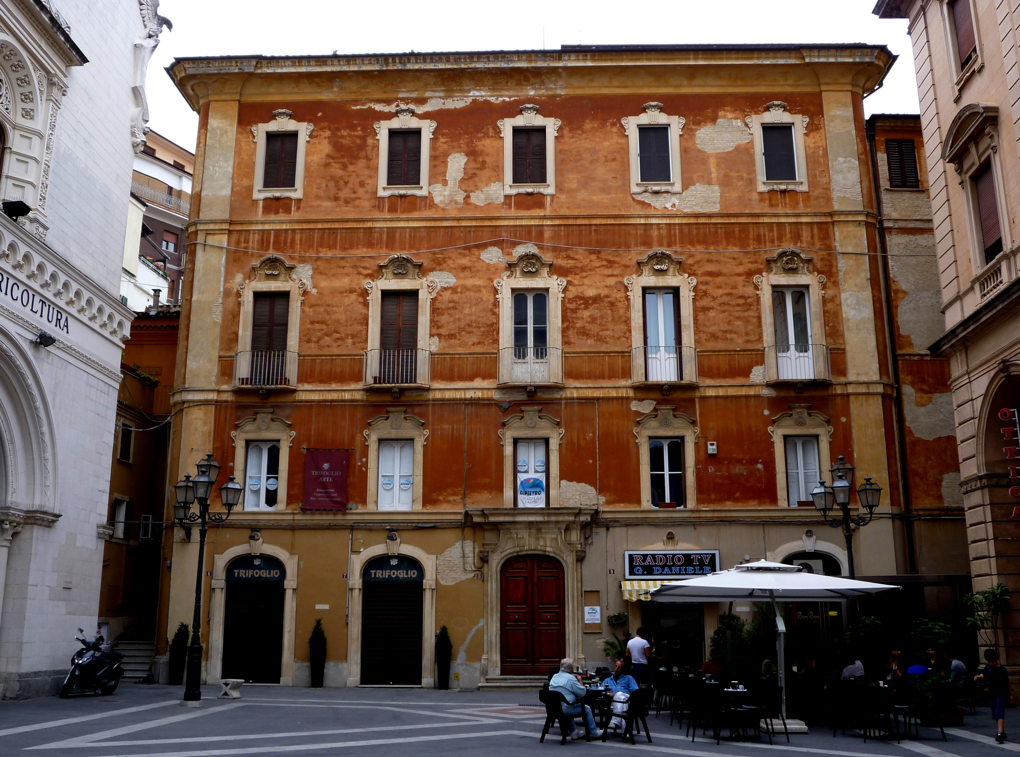 Facciata di Palazzo Fasoli, Chieti.